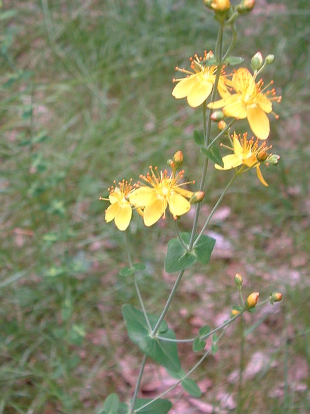 Hypericum pulchrum L. La Sauve (Gironde, France) 2004 - GFDL